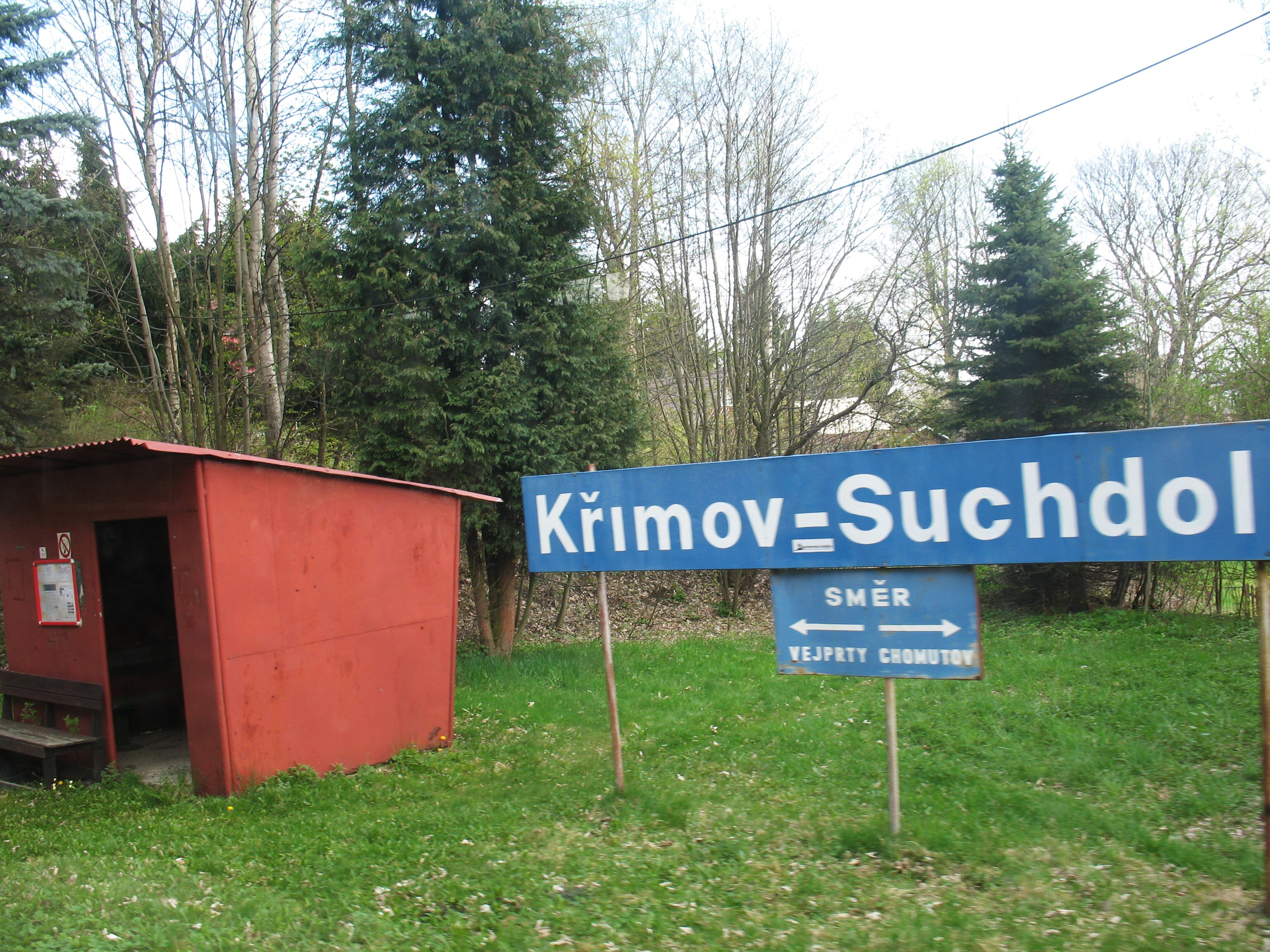 Železniční zastávka Křimov - Suchdol